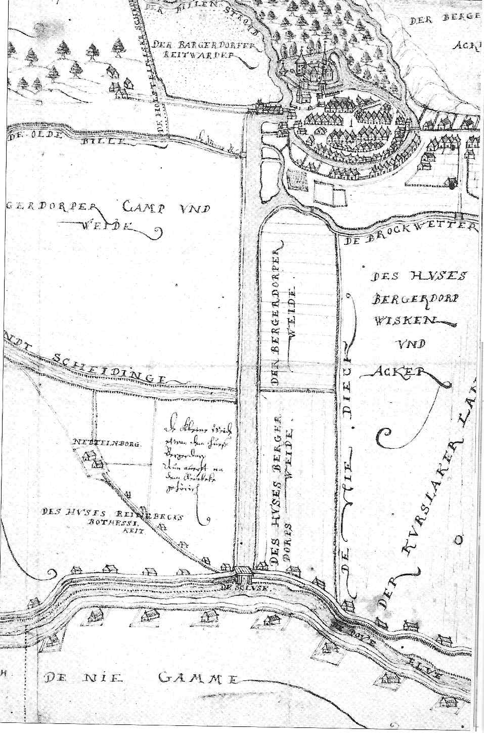 Bergedorf und Nettelnburg auf der Lüneburger Karte von ca. 1615. Das Original befindet sich im Stadtarchiv Lüneburg.